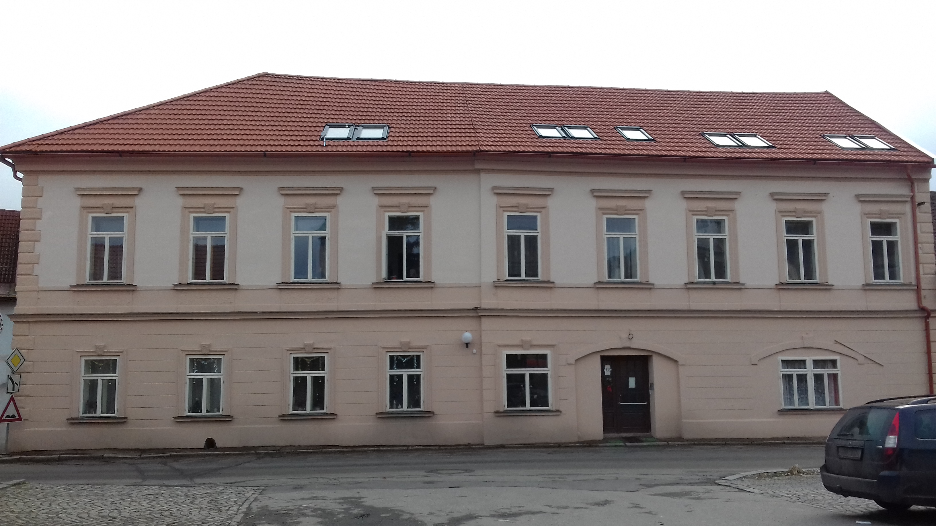 zrekonstruovaný objekt bývalého hotelu Koruna